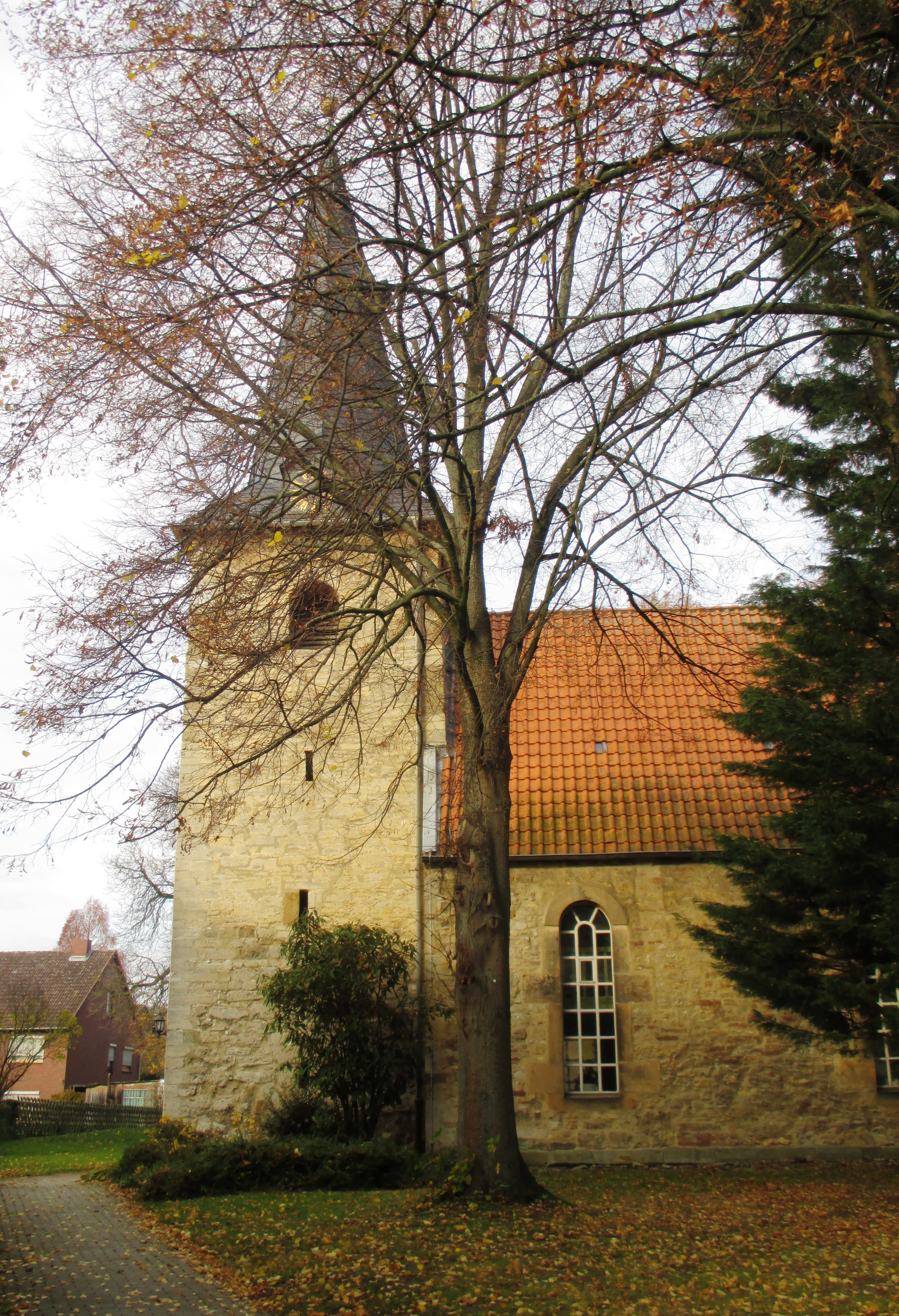 evangelische Kirche in Berel, Gemeinde Burgdorf, Landkreis Wolfenbüttel